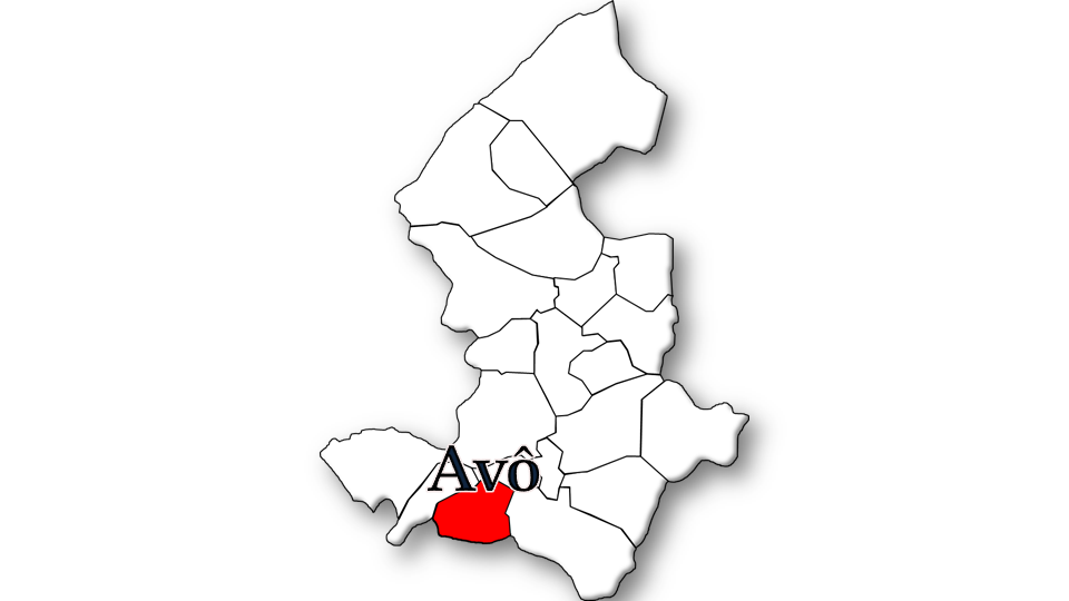 População